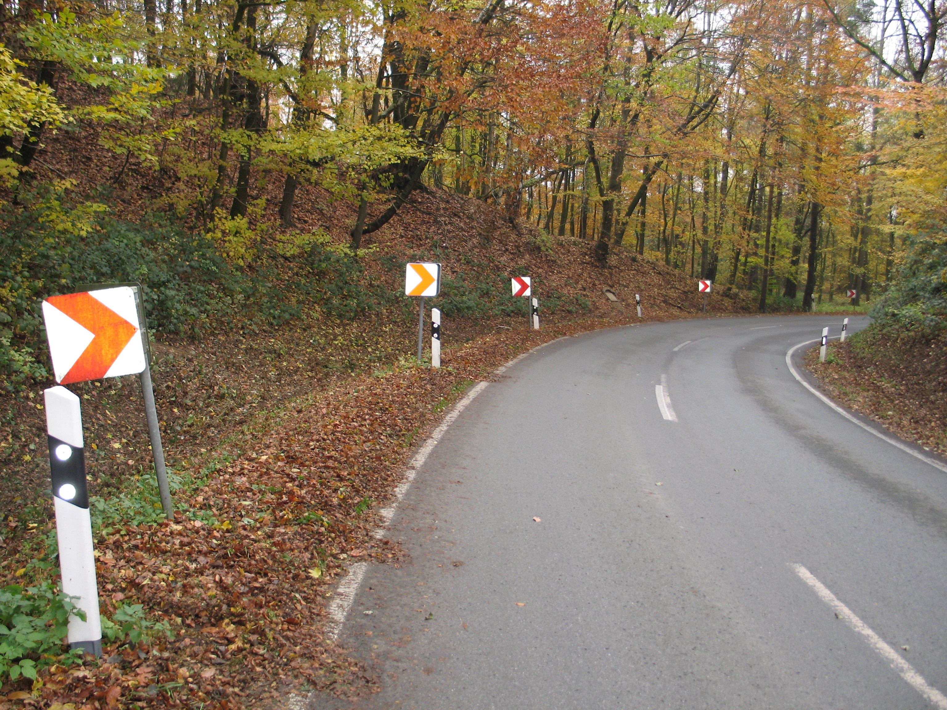 Durchbruch am Kamm der Egge des Wiehengebirges, entstanden als Notstandsarbeiten 1924-1927 der Stadt Preußisch Oldendorf, rudimentäre Spuren von Sauriern wurden gefunden. Blick nach Norden auf die , siehe Harlinghausen